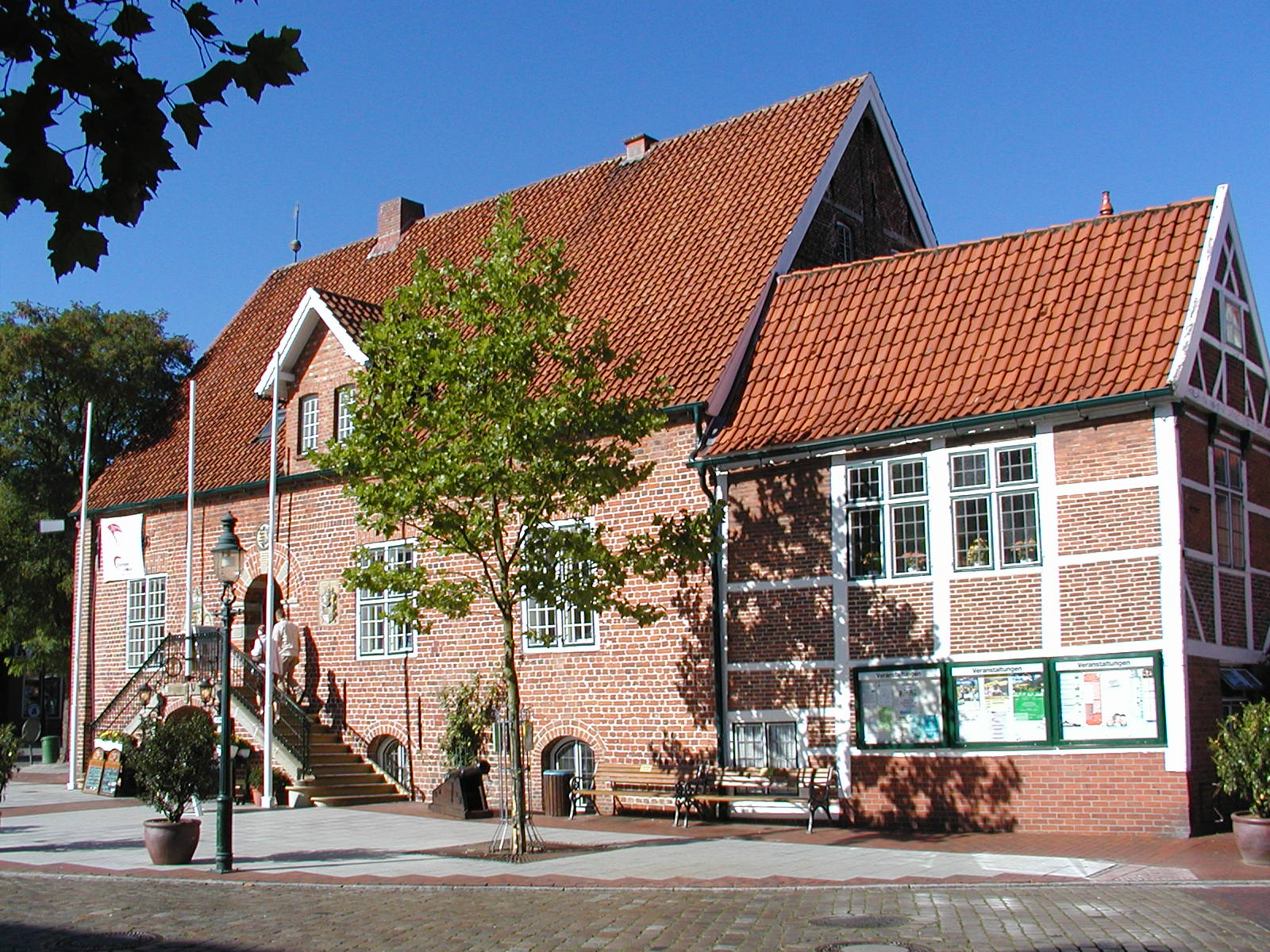 Radnice v německém Otterndorfu.